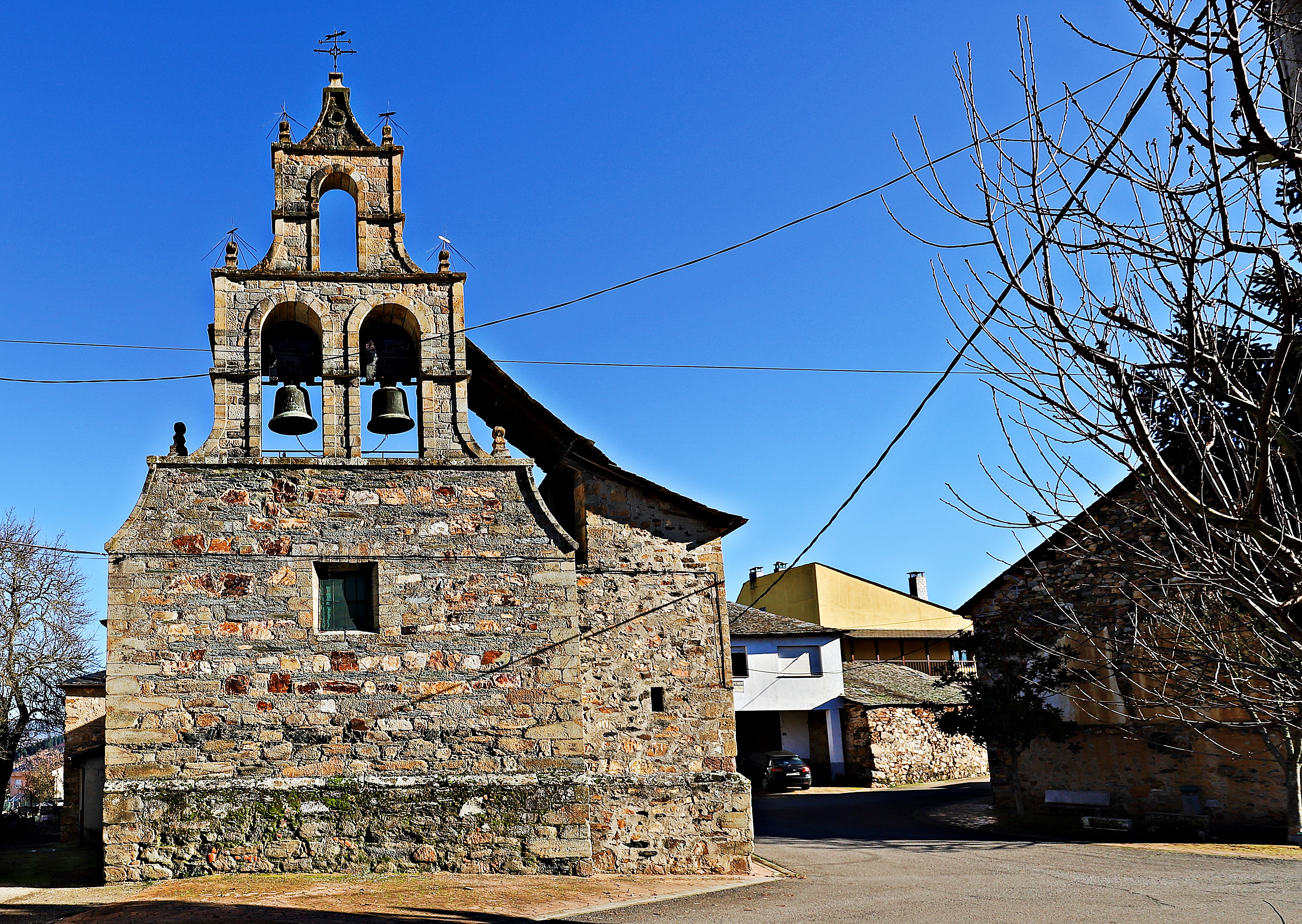 Sésamo es una localidad que pertenece al municipio de Vega de Espinareda, comarca de El Bierzo, provincia de León.